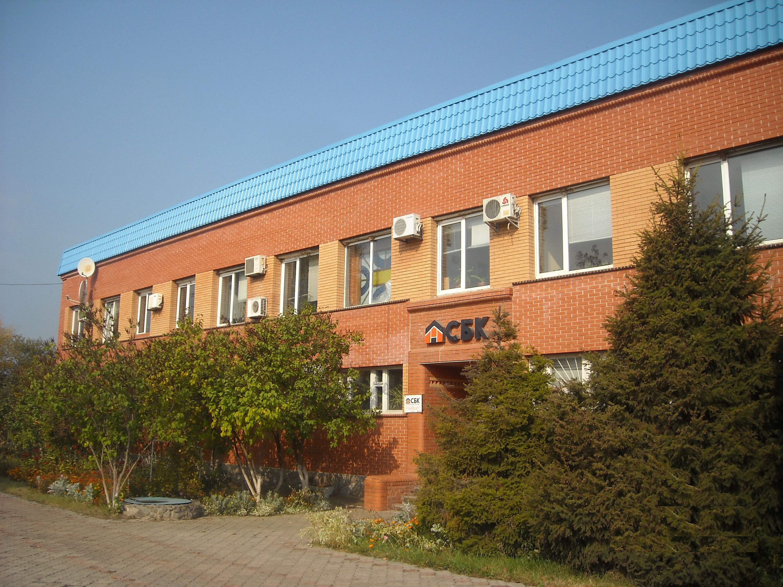 ПрАТ "СБК"